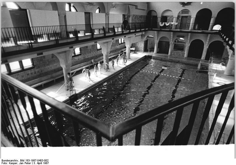 ADN-ZB Kasper 3.4.87 Bez. Gera: Kommunalpolitik- Seit dem 26.3.1987 lädt das Jenaer Volksbad wieder zum Schwimmen ein. Vormittags ist es für die Schulen reserviert. Das 70 Jahre alte Gebäude beherbergt neben der Schwimmhalle zwei Saunas, ein Solarium, Wannenbäder, Fußpflegesalon und Erfrischungsraum. - siehe auch 1987-0403-1,3 und 4N